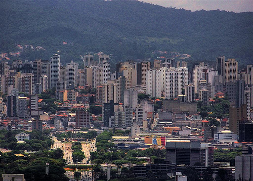 Foto do bairro de Santana, zona norte de São Paulo. Tirada do edifício Altino Arantes.